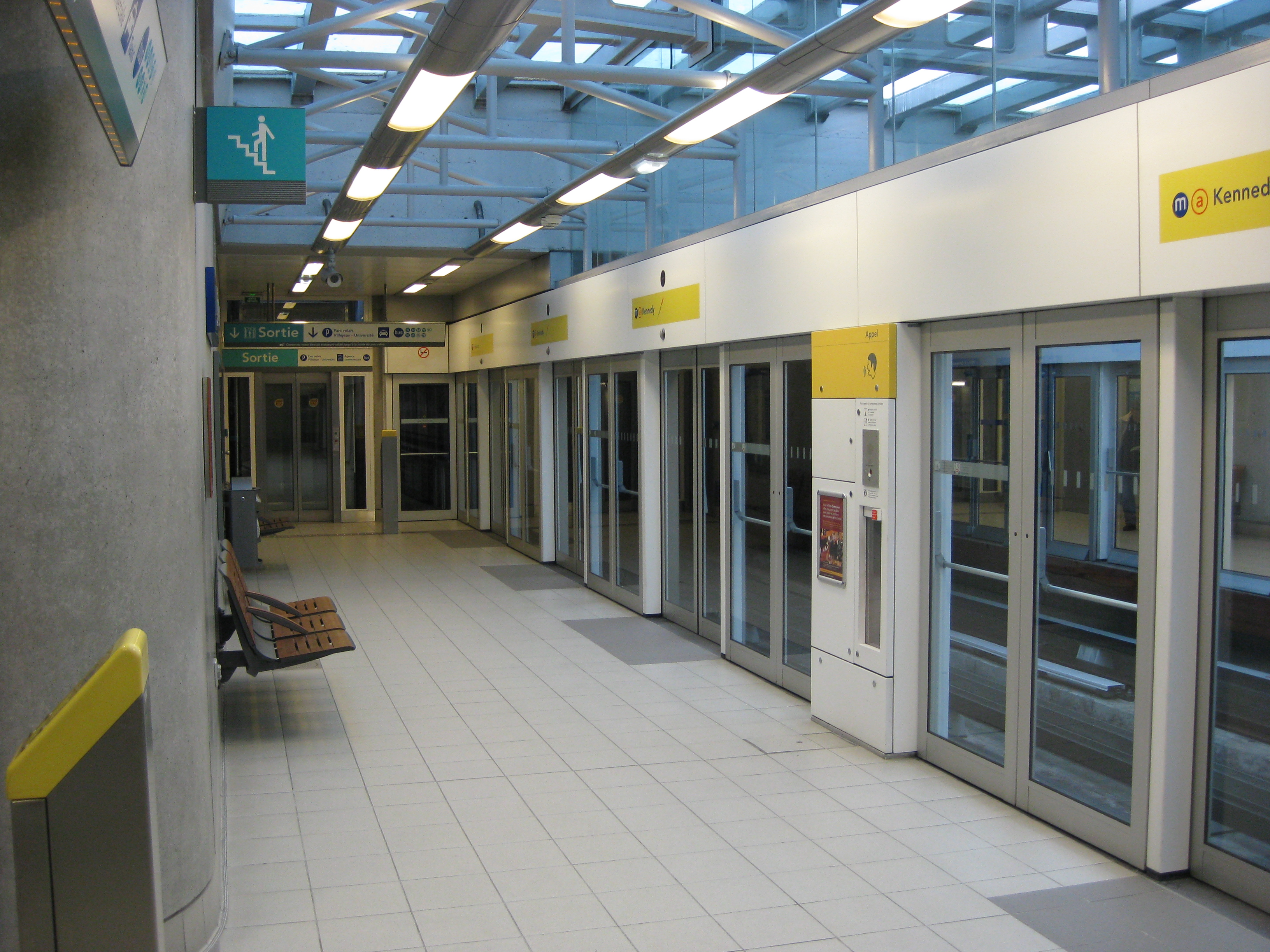 Vue de la station Villejean-Université du métro de Rennes, direction J.F. Kennedy.